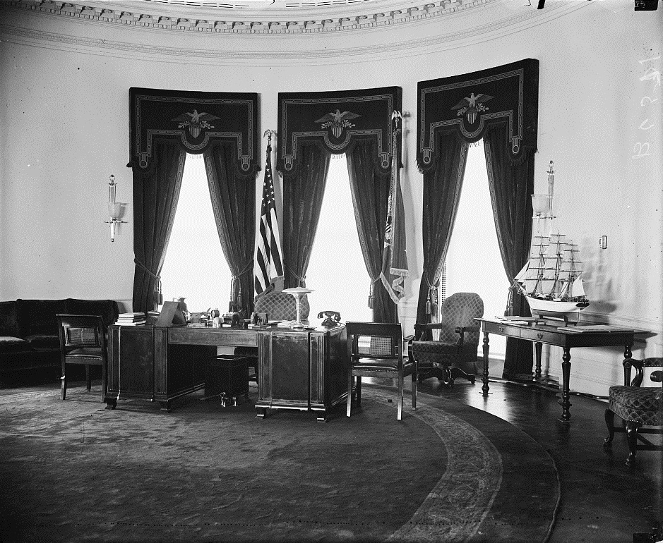 Franklin Delano Roosevelt Oval Office